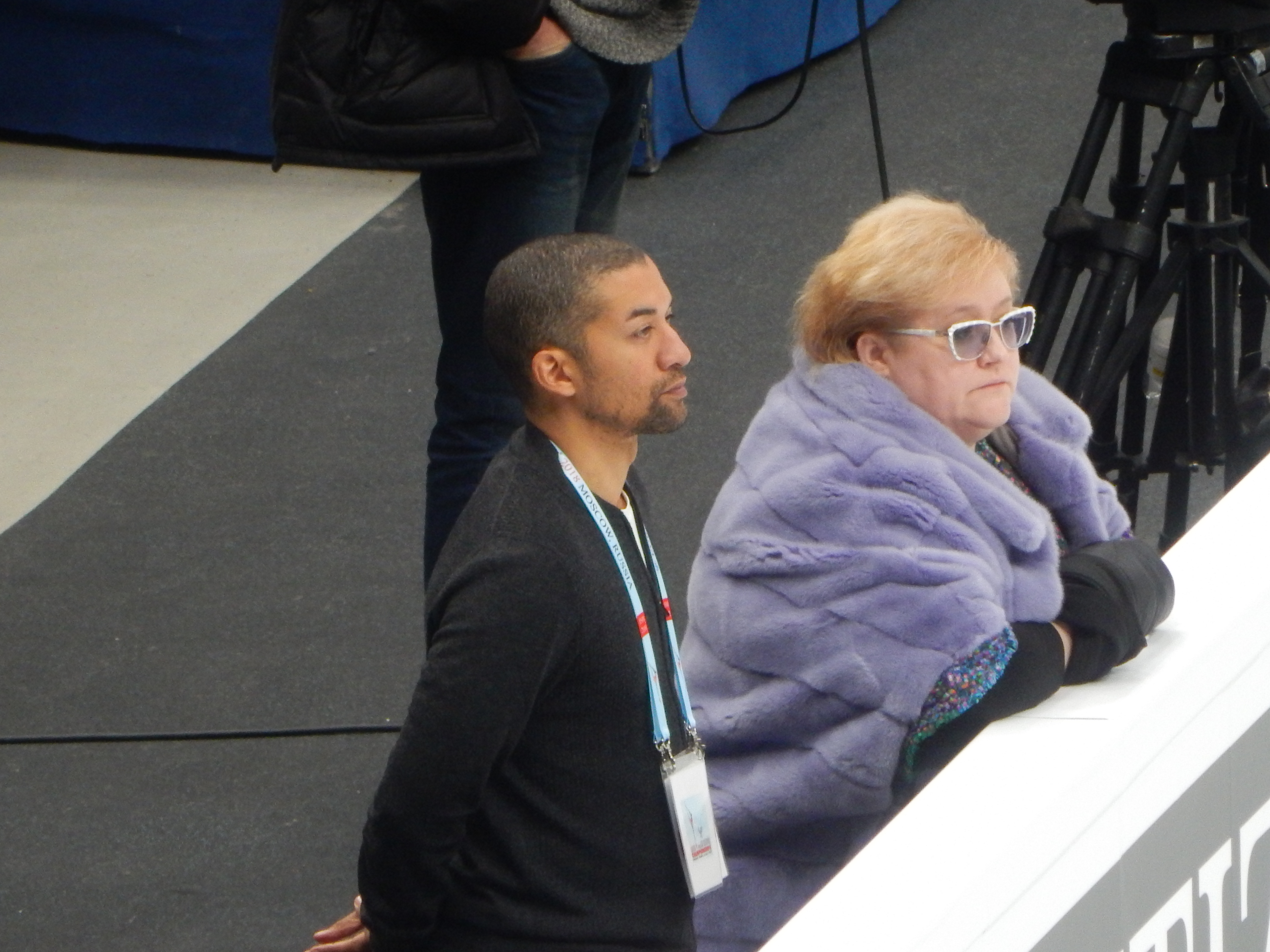 Чемпионат Европы по фигурному катанию 2018 в Москве. Первый день соревнований (17 января). Тренеры российской пары (Евгения Тарасова и Владимир Морозов) Робин Шолковы и Нина Мозер